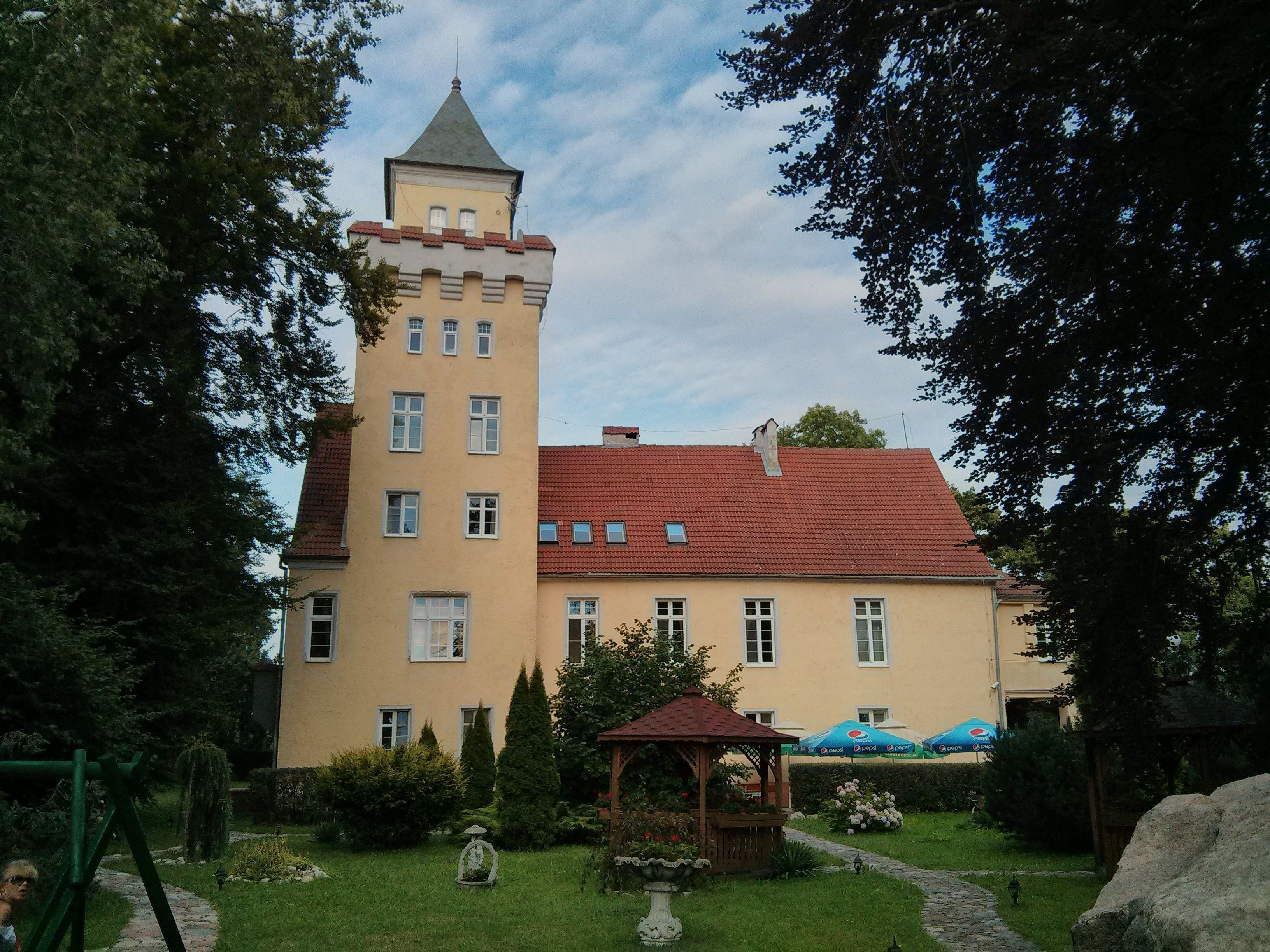 Nowęcin, pałac, XVI, 1909, 1960